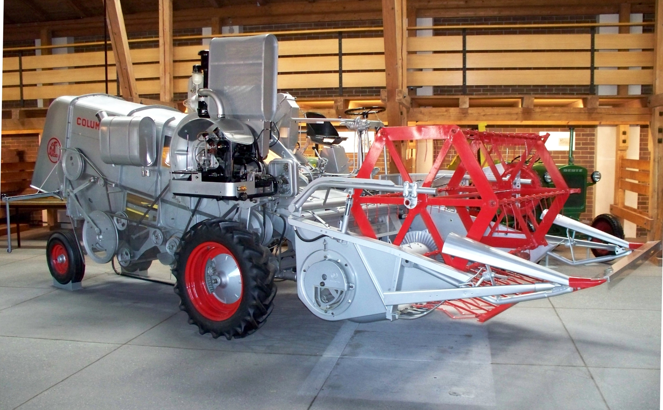 Der Selbstfahr-Mähdrescher Claas Columbus aus dem Jahr 1961 im Deutschen Museum in München.